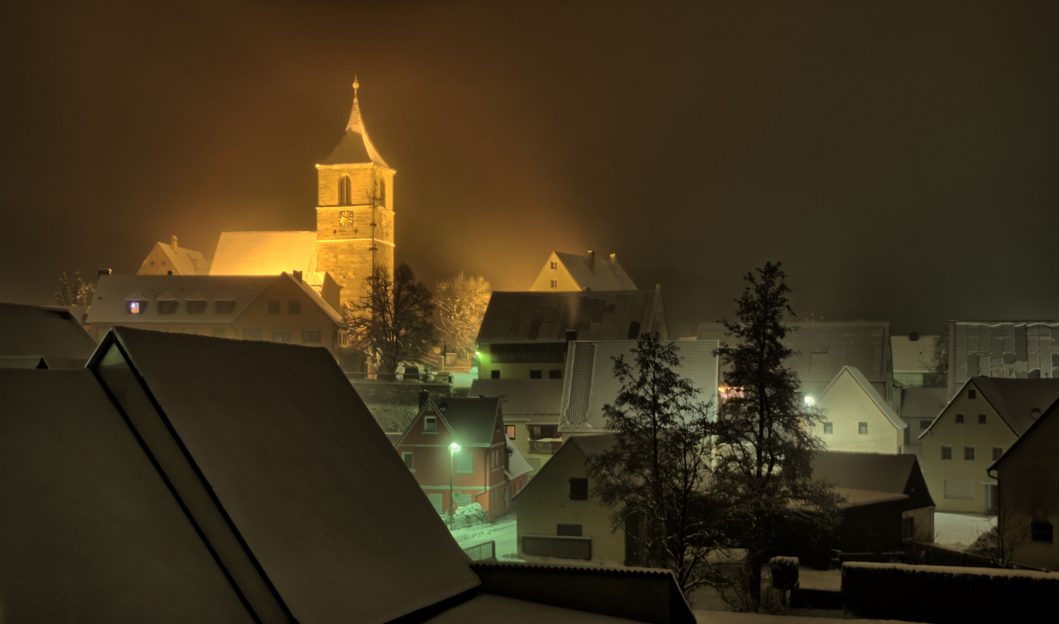 Veitsaurach im Winter bei Nacht mit St. Vitus Kirche